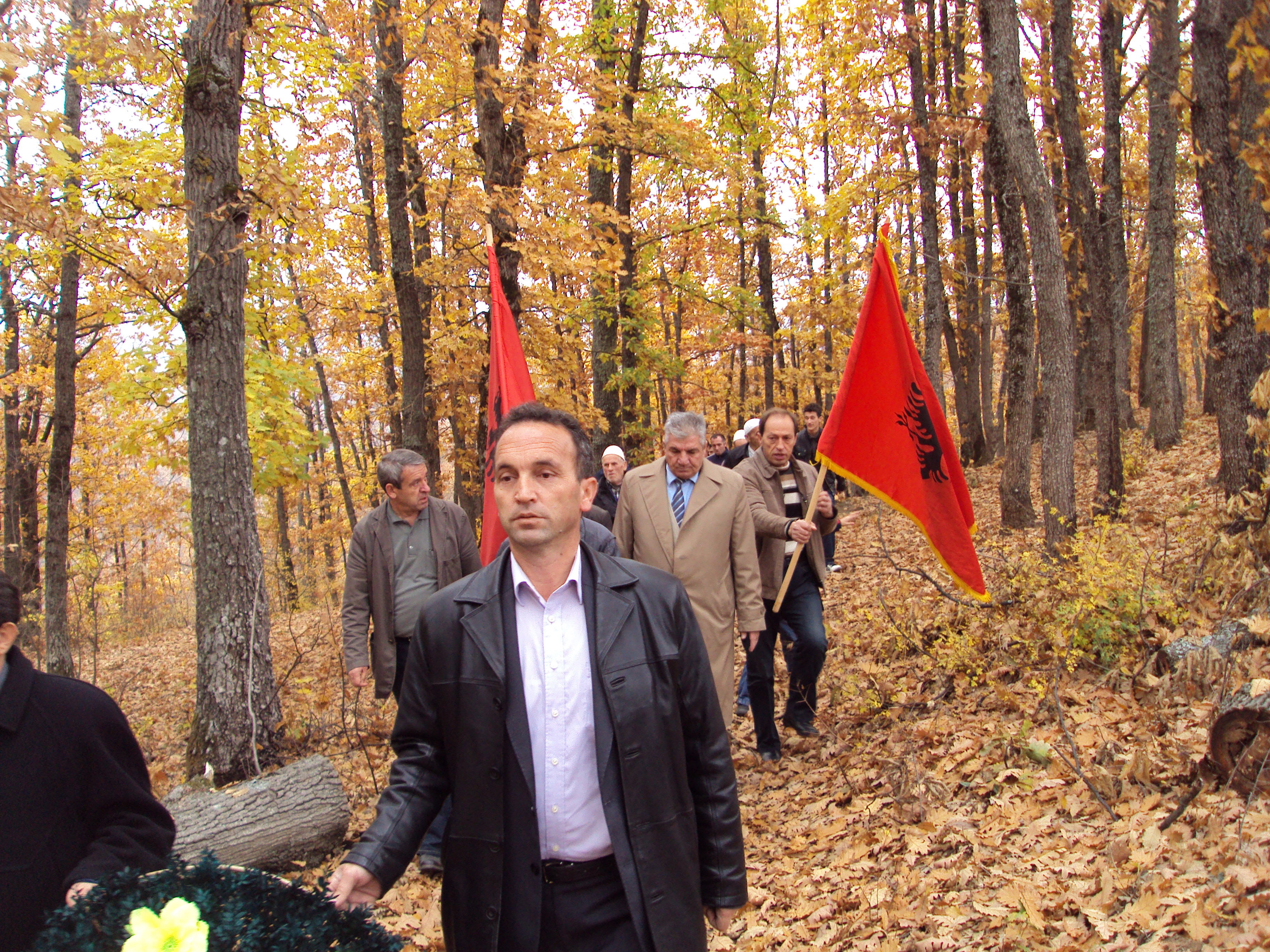 Me rastin q 100 vjet të shtetit shqiptar homazh pran varrit të Imer Myqybaj në varrezat e fshatit Kokaj, Karadak të Gjilanit